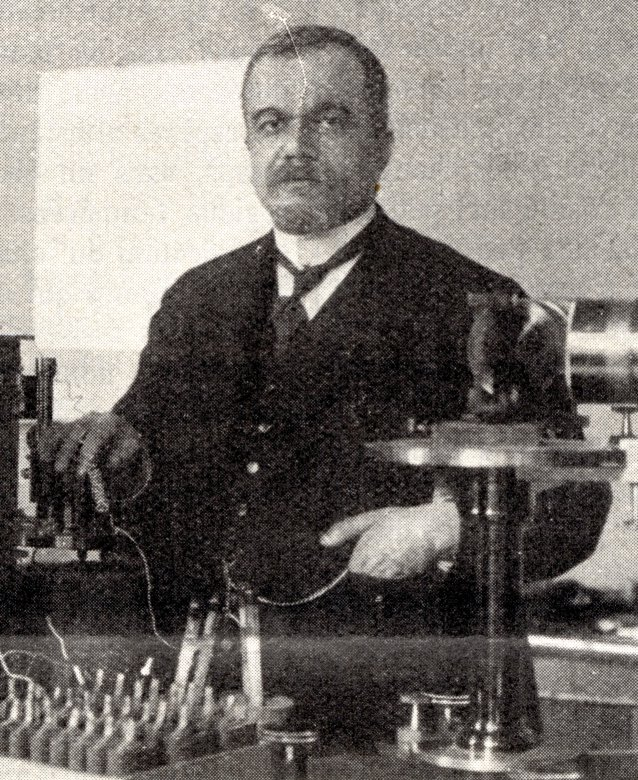 Portrait de Louis Georges Gouy